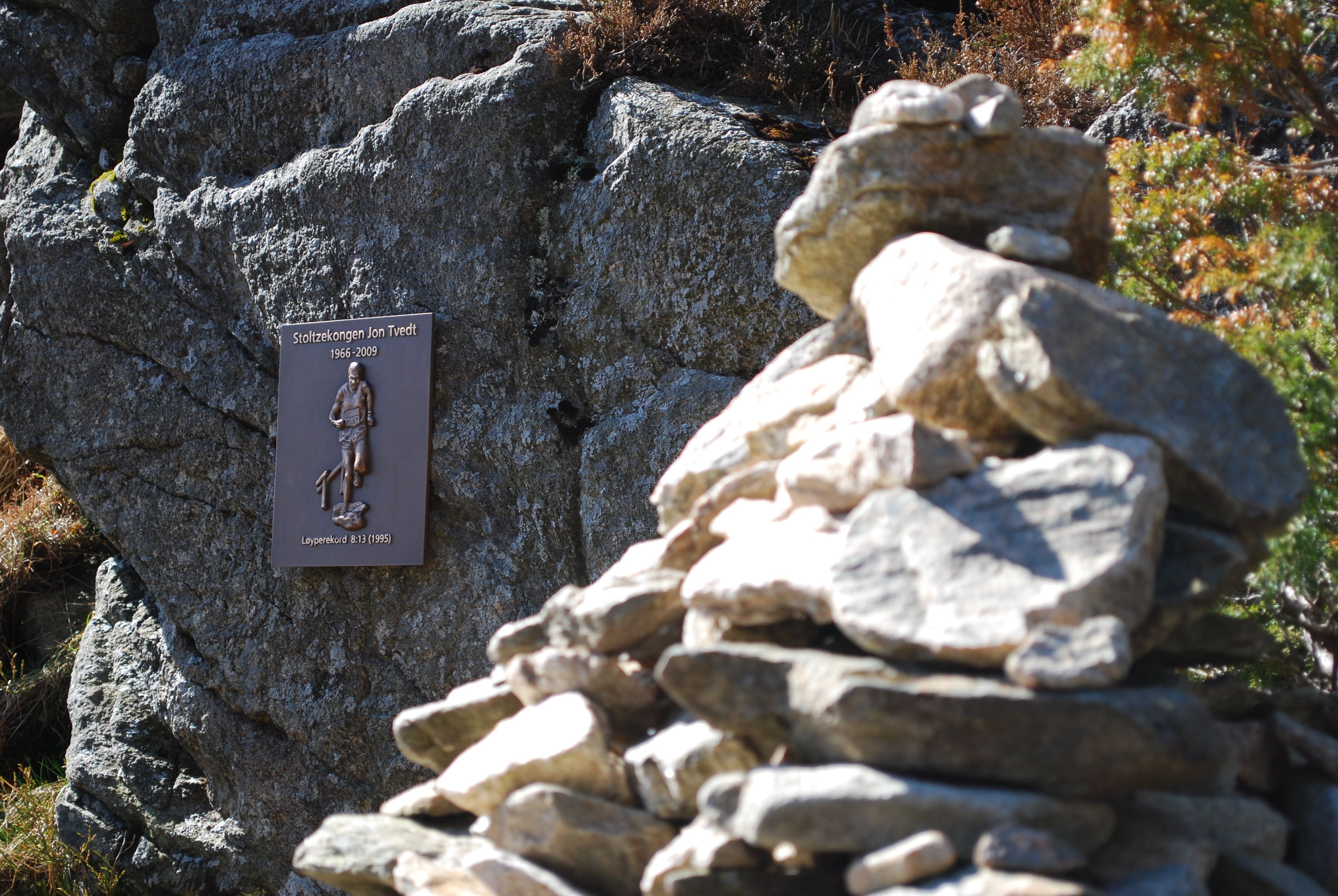 Stoltzekongen Jon Tvedt